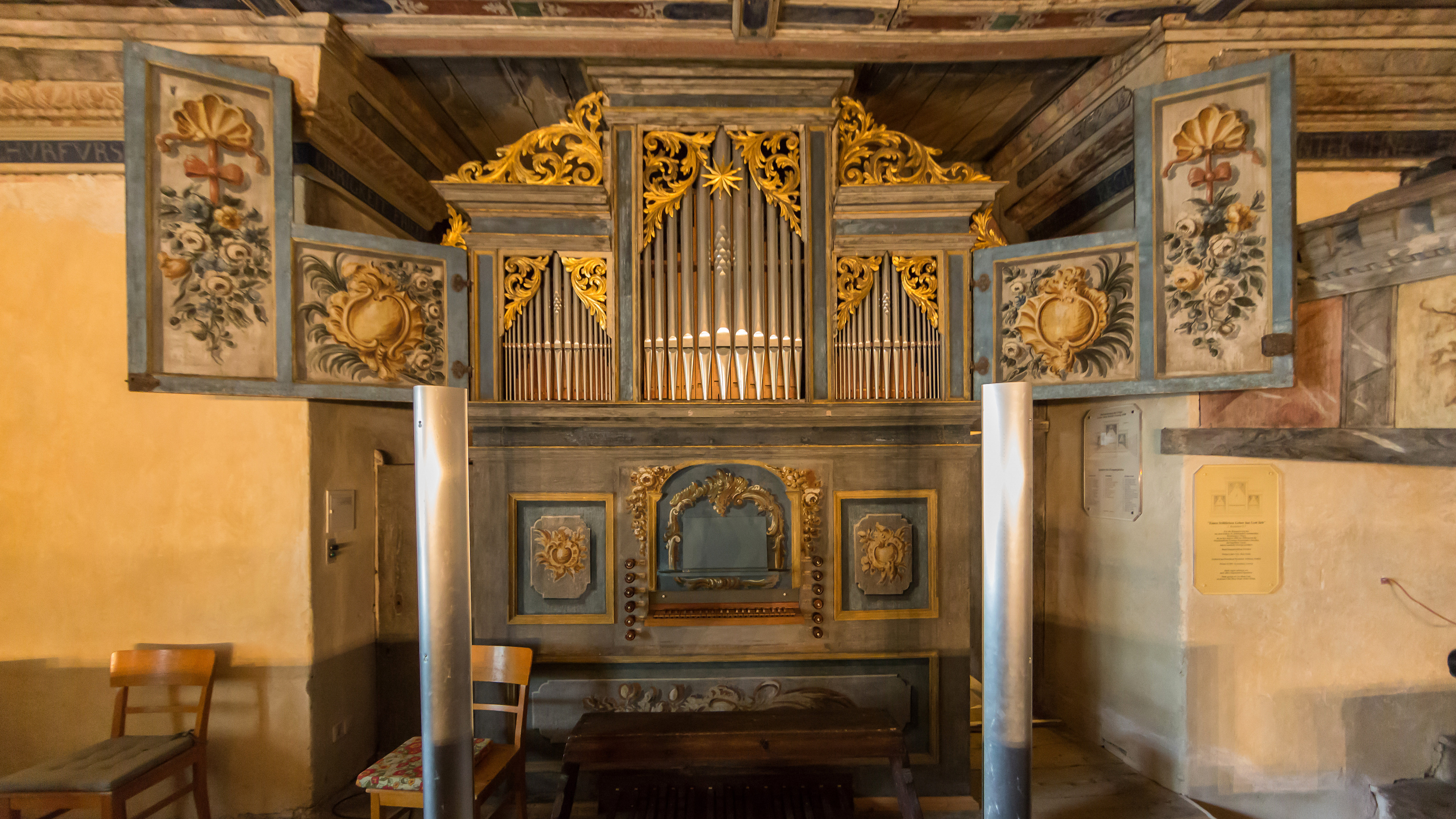 Coswig Ravensburger Platz Alte Kirche Renaissance-Orgel VII